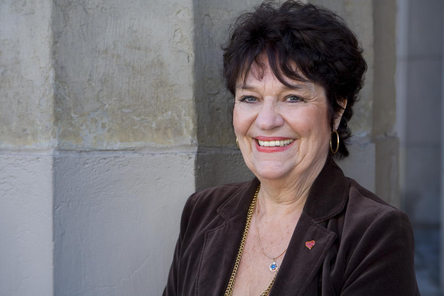 ternstrom_solveig_02